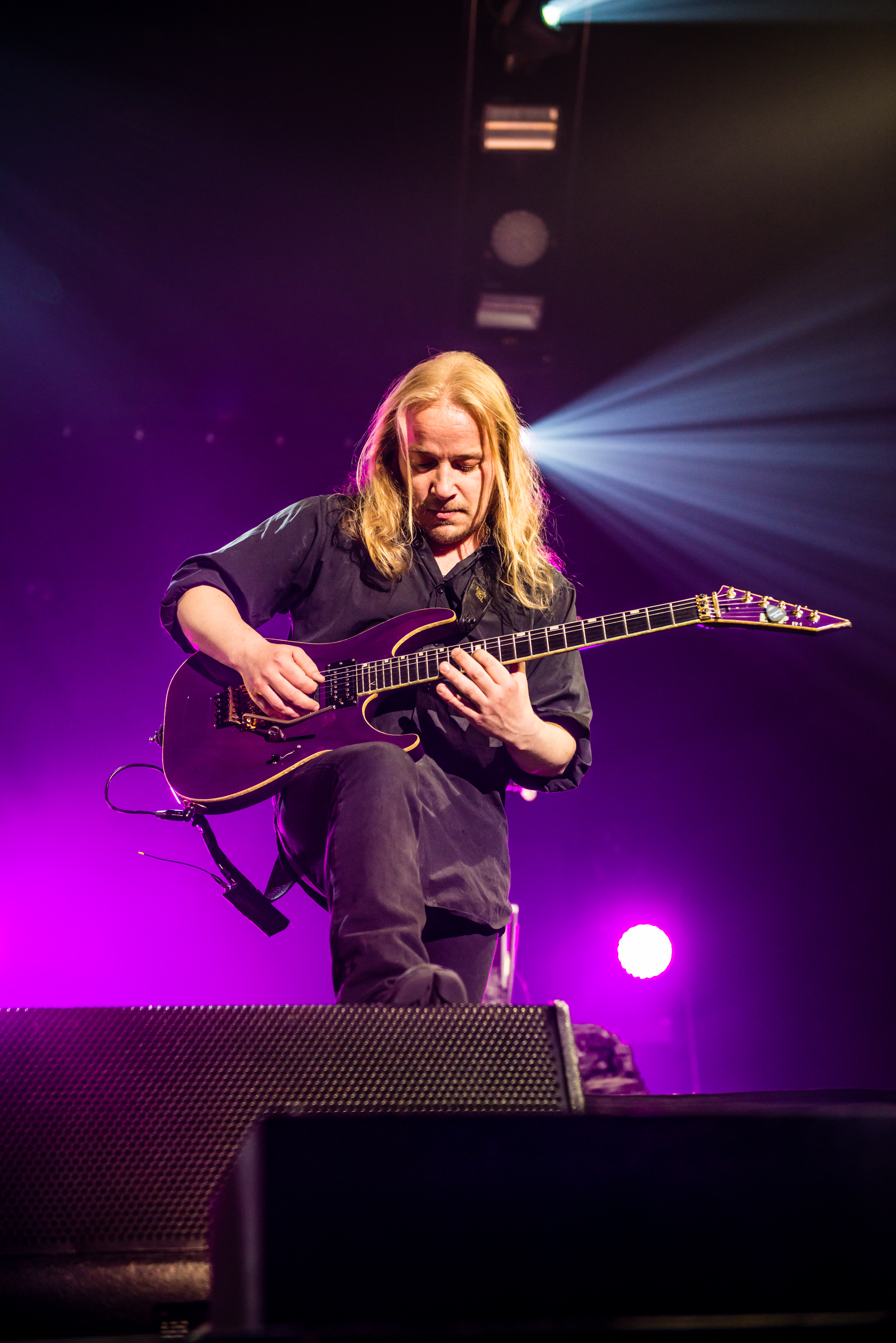 'Nightwish Endless forms most beautiful Tour 2015 Oberhausen'